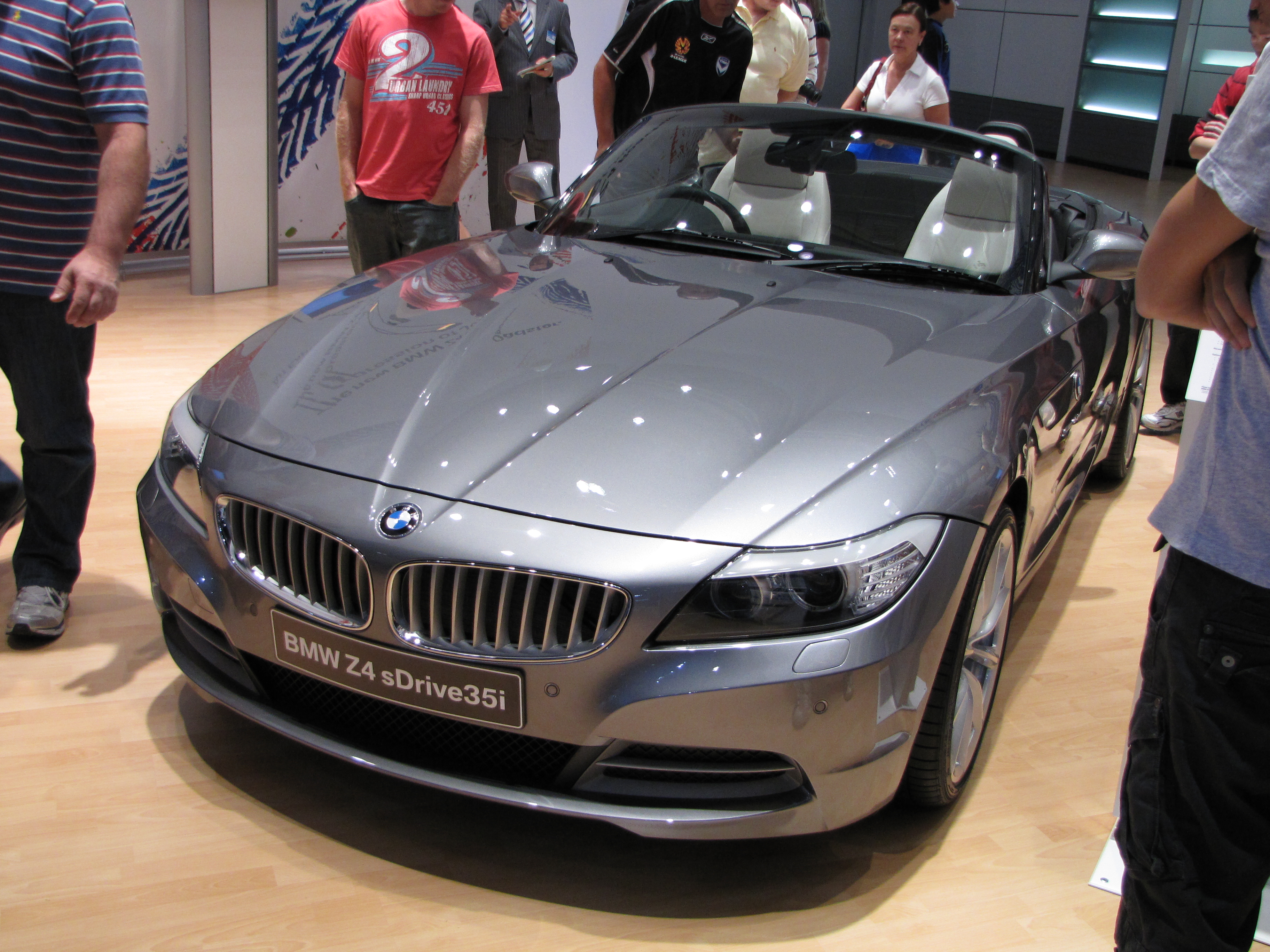 20090228_SX1IS_054